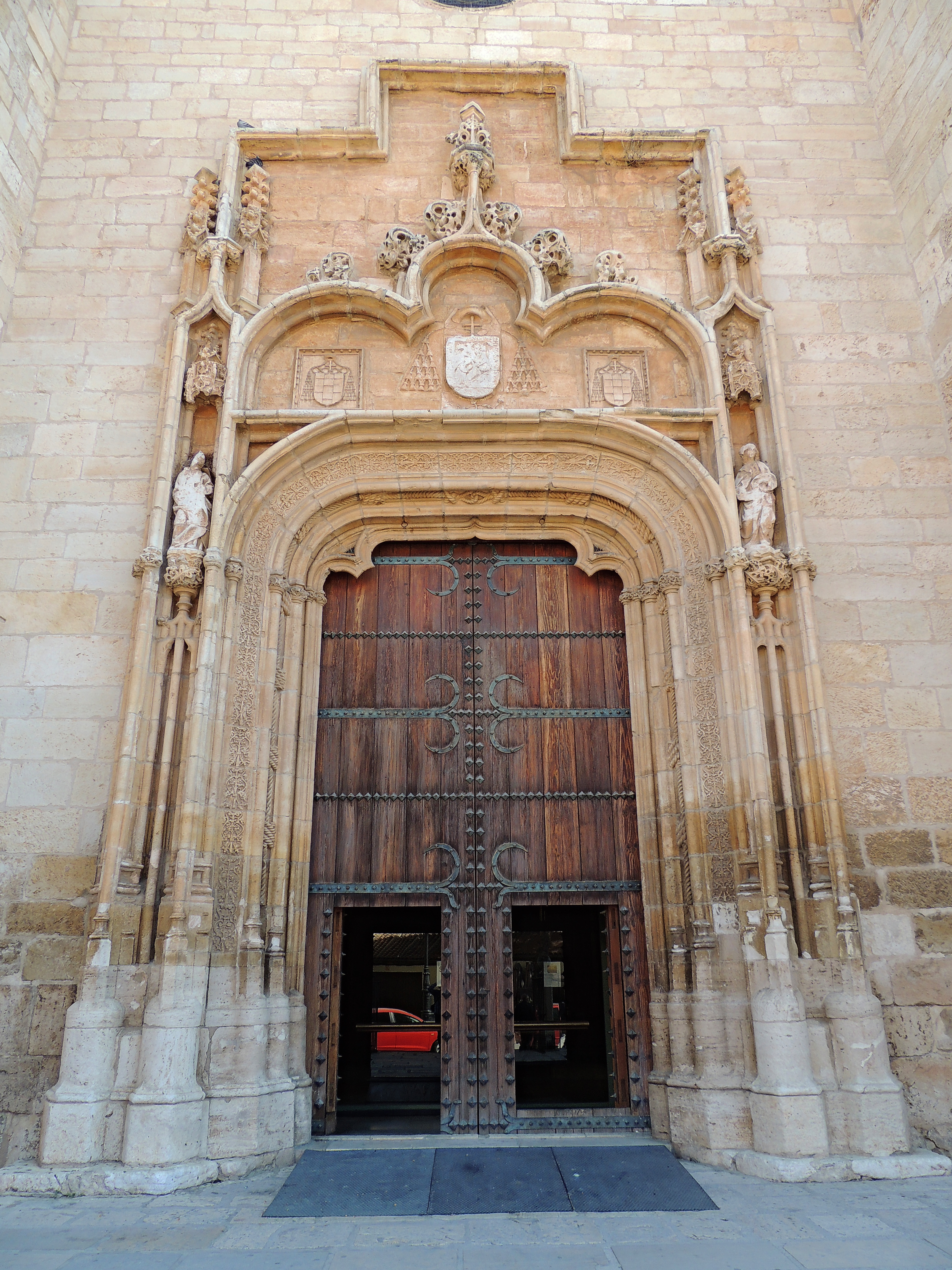 Portada occidental de la catedral de Alcalá de Henares